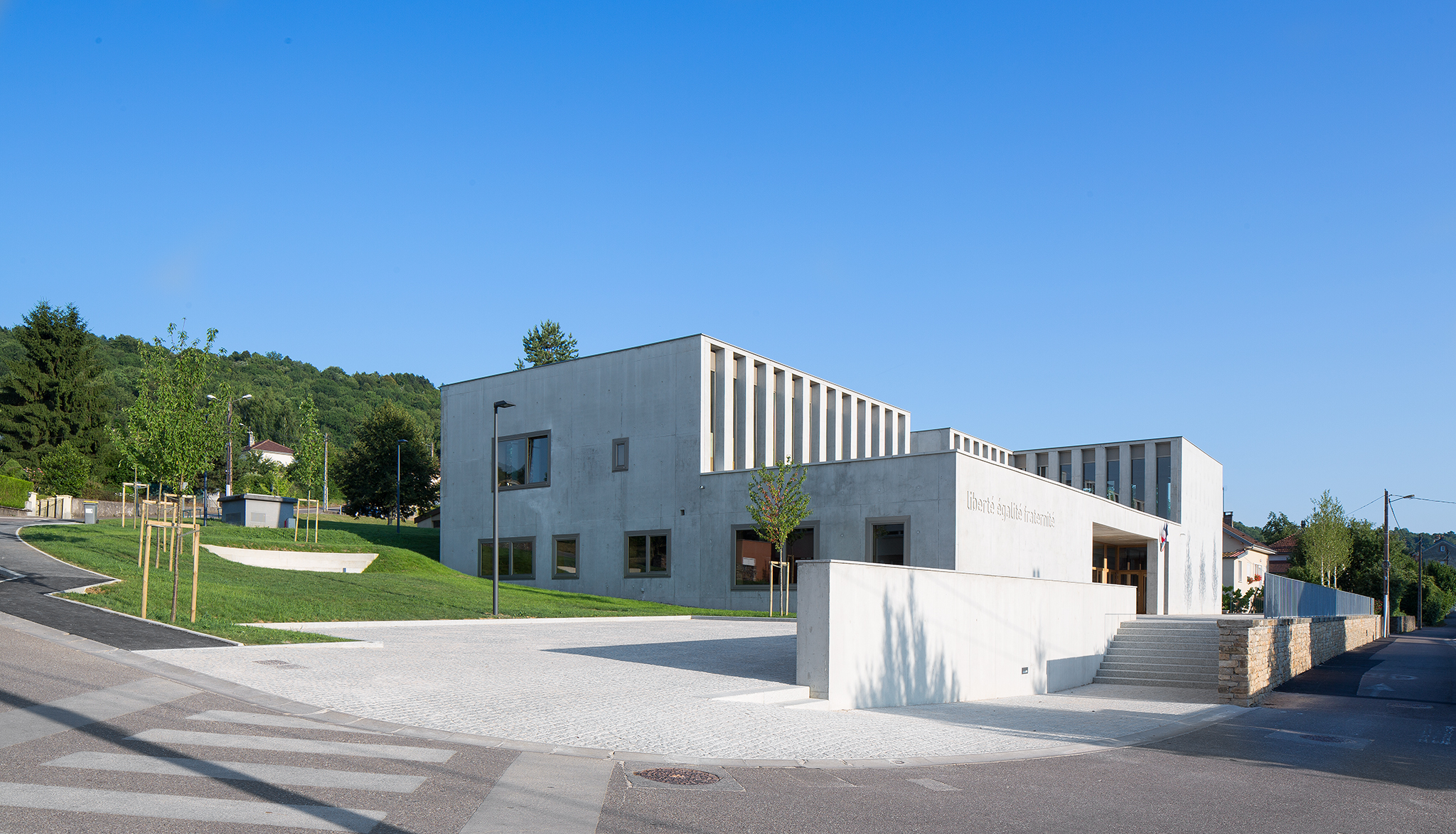 Maison commune